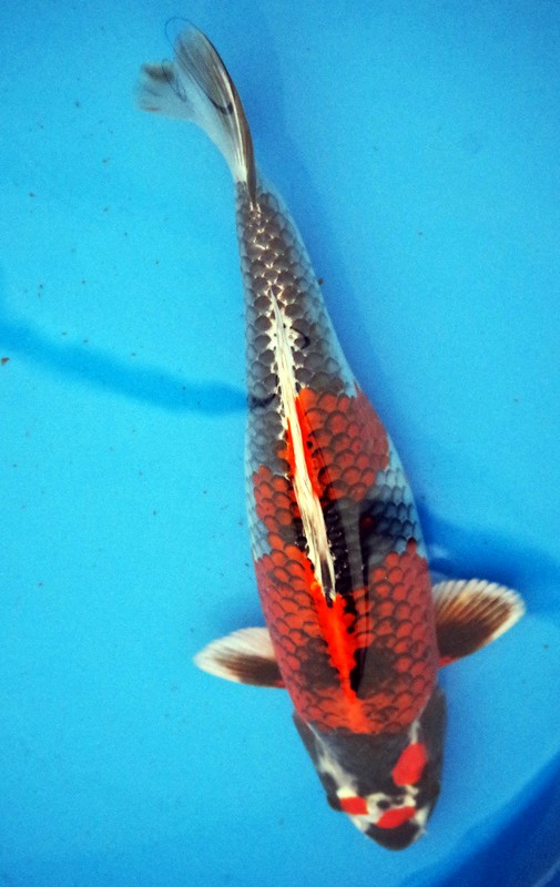 Croisement entre Goshiki et kujaku effectué par un éleveur.